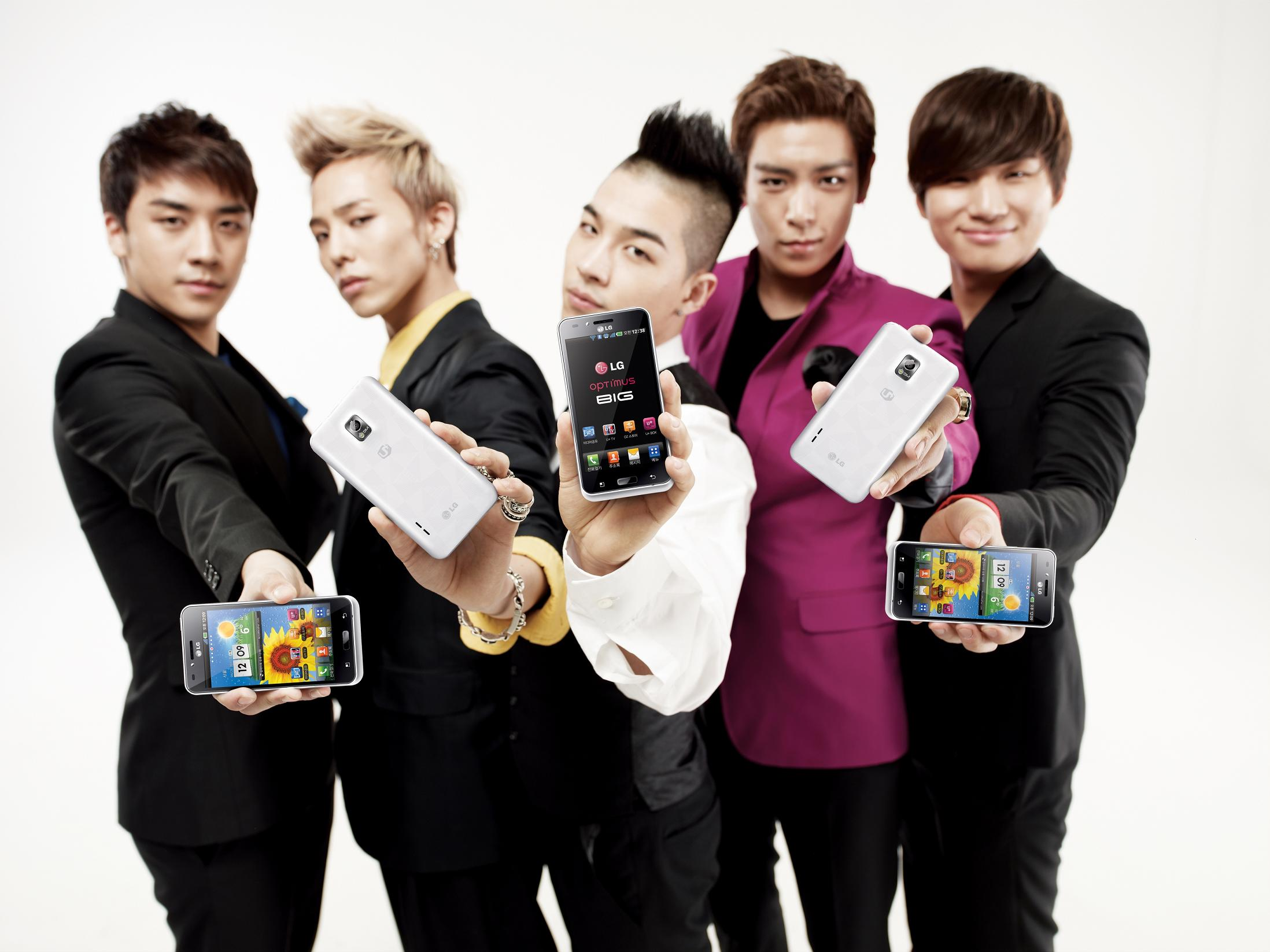 LG전자 옵티머스 빅의 광고모델인 빅뱅이 옵티머스 빅 제품을 소개하고 있다.